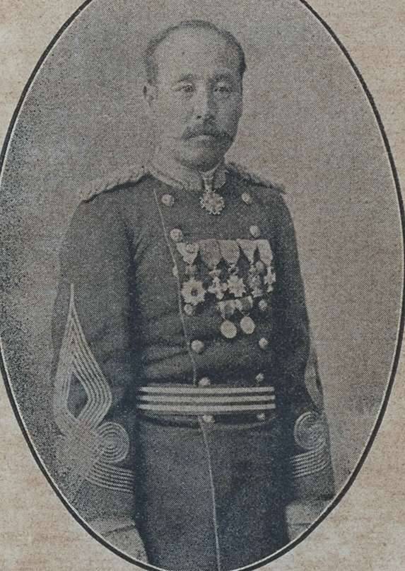 矢吹秀一男爵（1848～1909）